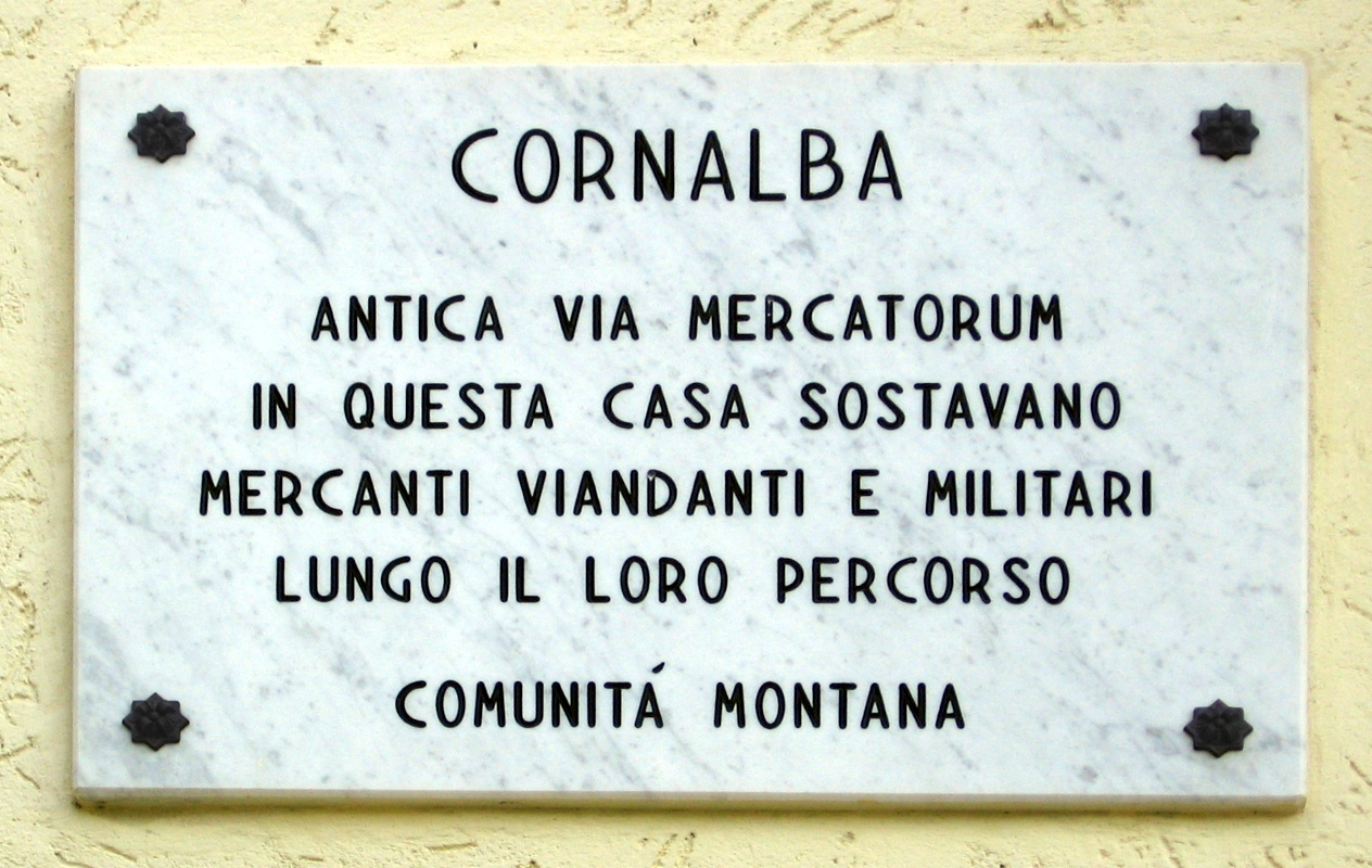 Cornalba, Bergamo, Italia - Targa lungo la via mercatorum